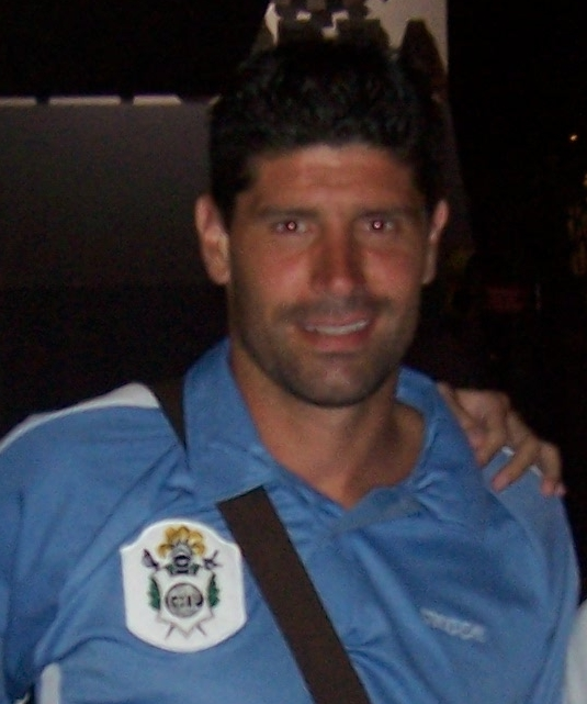 Foto del jugador argentino de fútbol Roberto Carlos Sosa, apodado el "pampa".